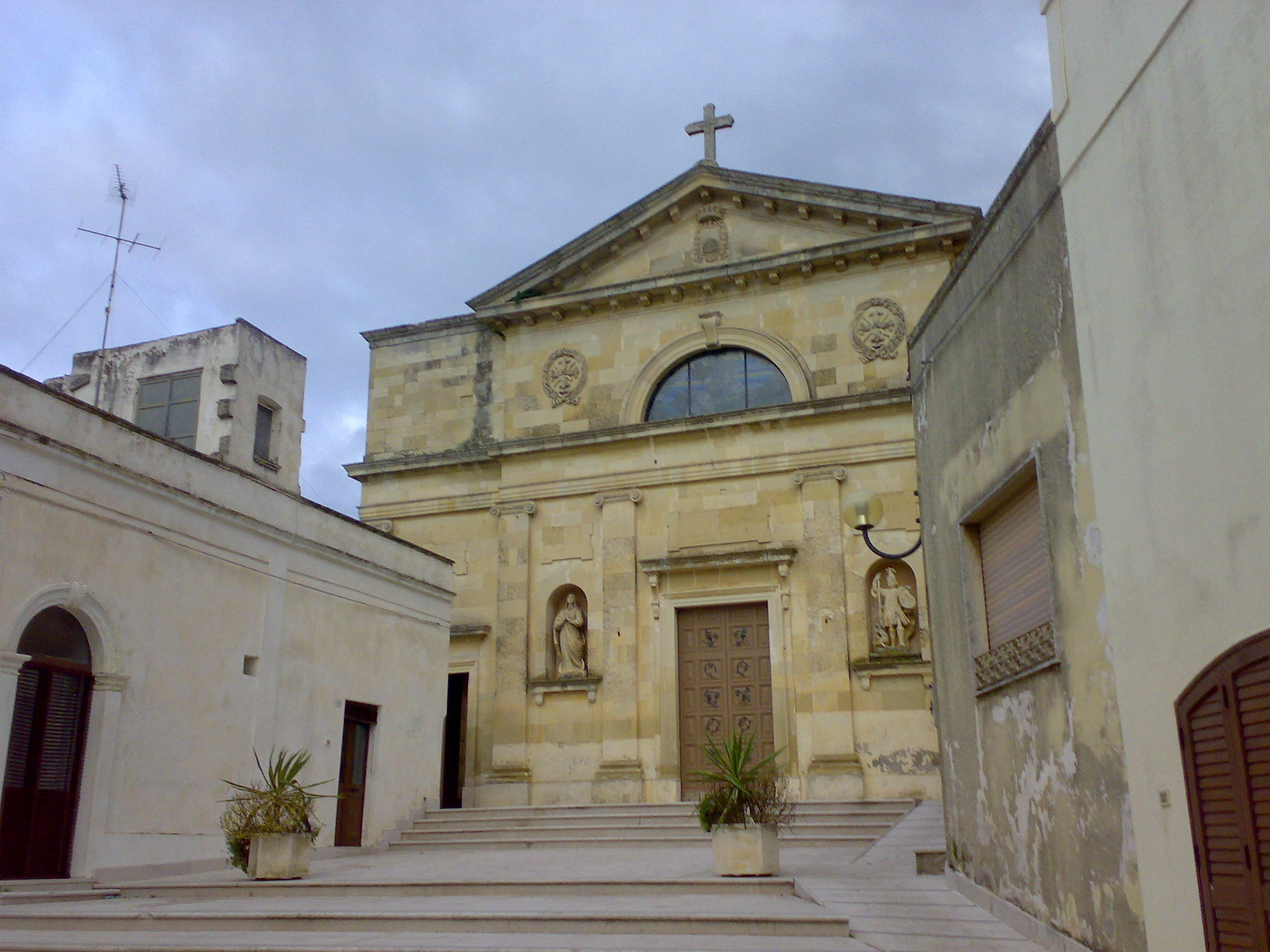 Chiesa Madre di Serrano, provincia di Lecce